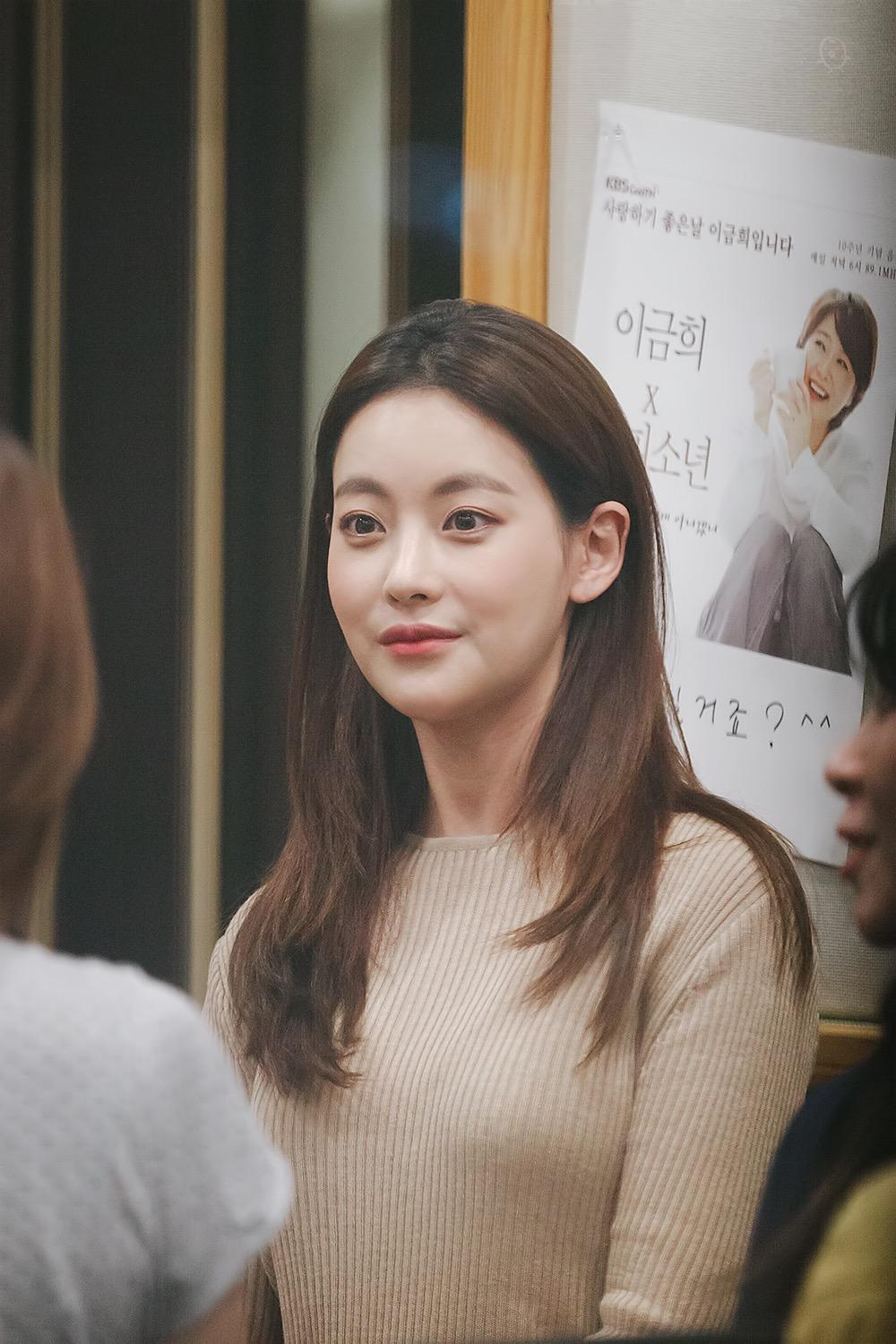 170821 김예원의 볼륨을 높여요 게스트